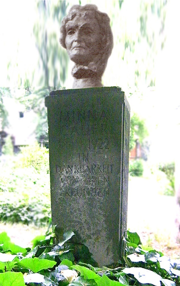 Minna Cauer ehem Grabsteinfigur, bis ca. 1940 auf Alter St.-Matthäus-Kirchhof. Foto aktuelles Grab mit Stele und Foto aus dem Original-Katalog Bildhauer Kurt Kroner 1920: L. Wekenborg (StMatthaeus)